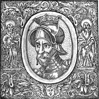 Přemysl Otakar II.